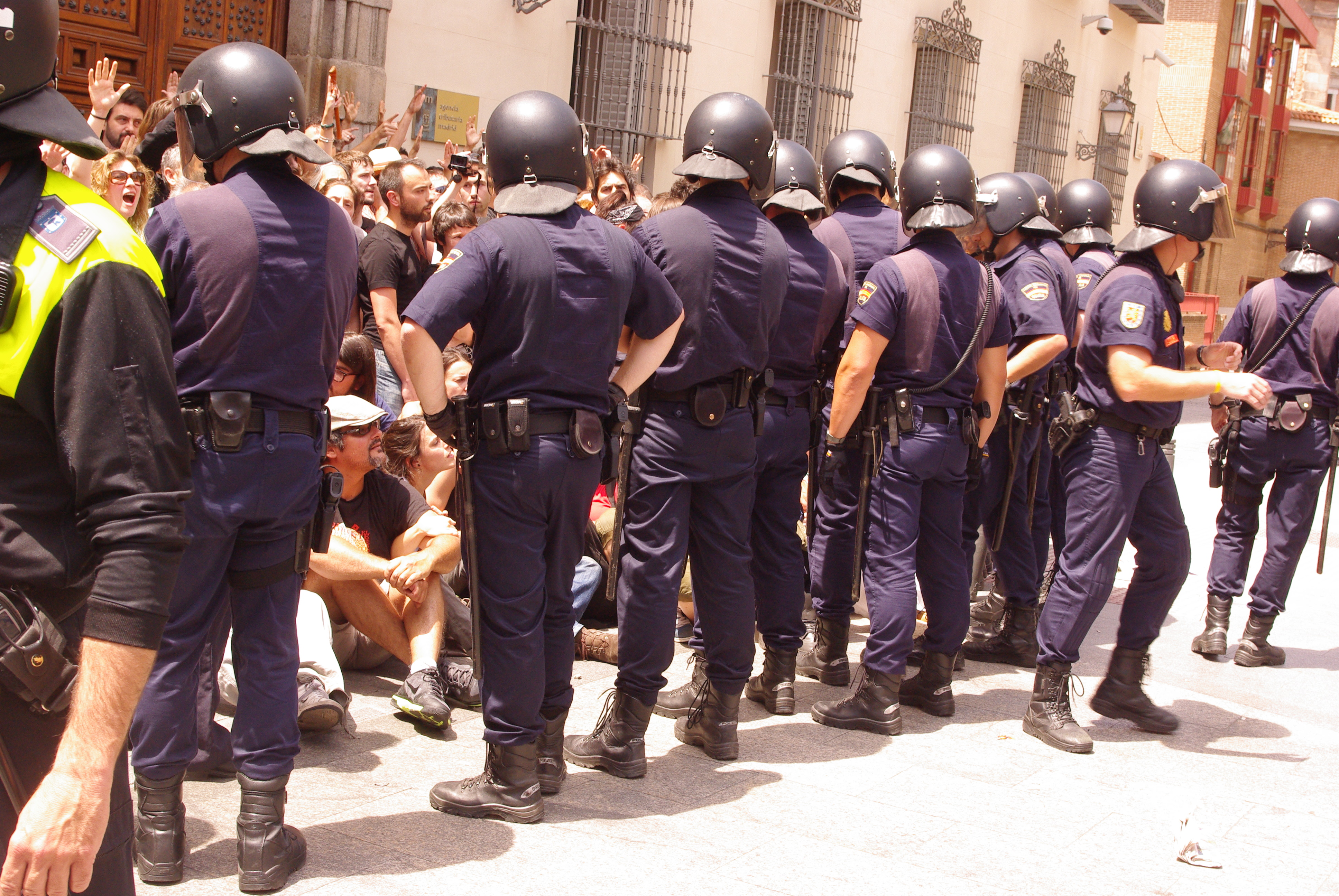 Concentración en la plaza de La Villa. En la parte posterior. Todavía hay espacio para que algunos puedan permanecer sentados.